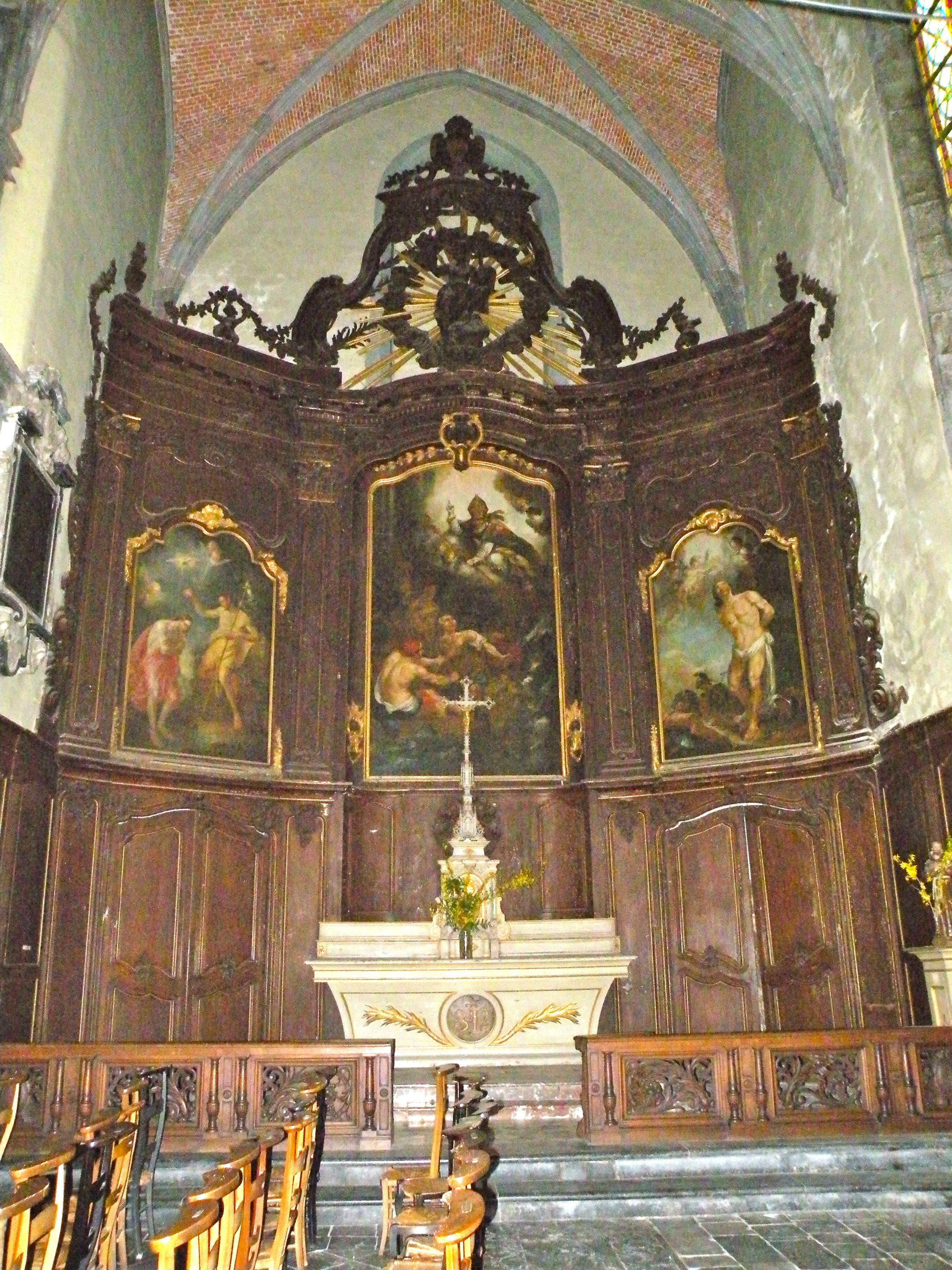 grande chapelle de saint nicolas Collégiale Saint-Nicolas d'Avesnes-sur-Helpe